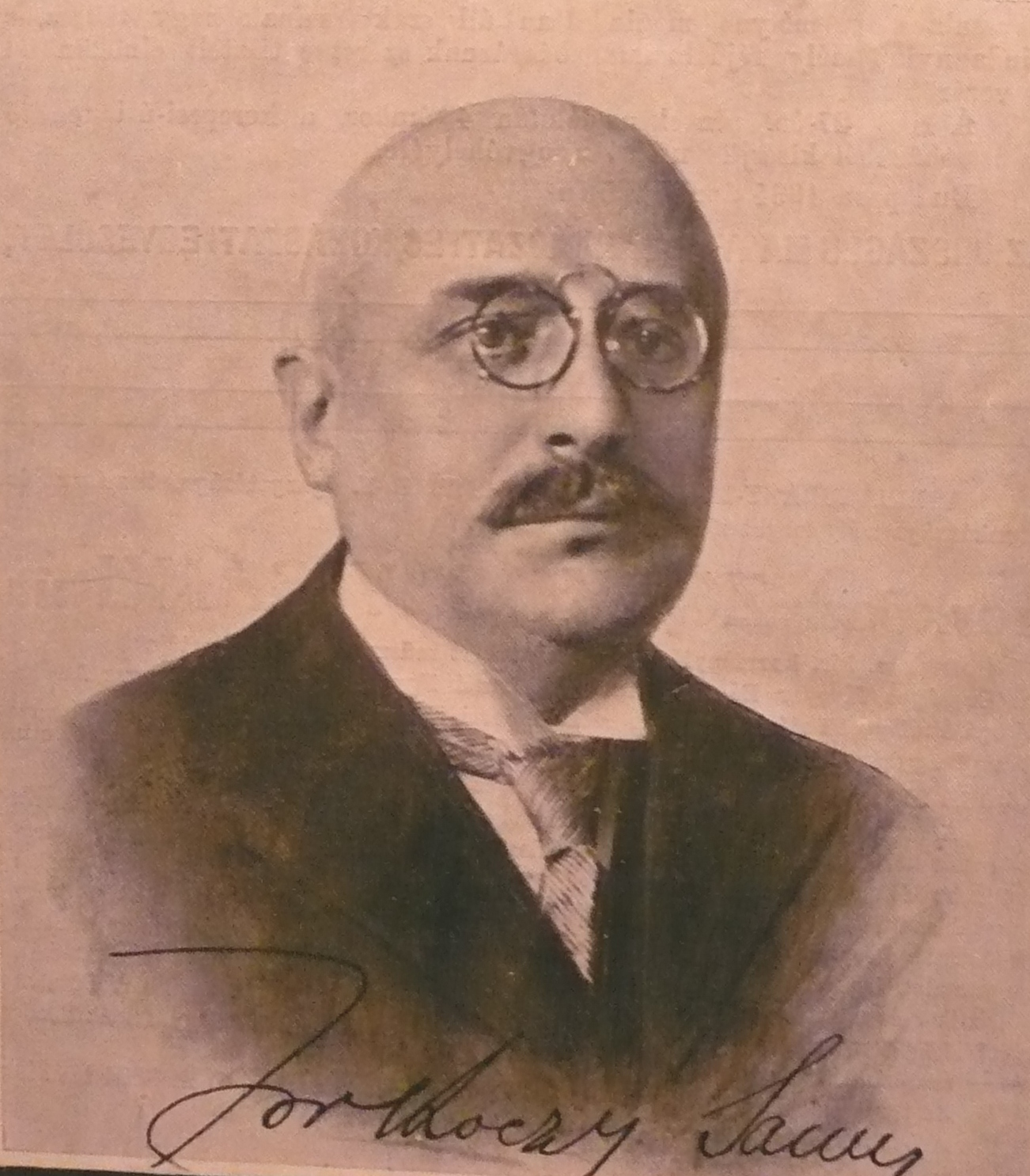 Zorkóczy Samu kohómérnök, a magyar vaskohászat egyik legnagyobb fejlesztő mérnök egyénisége